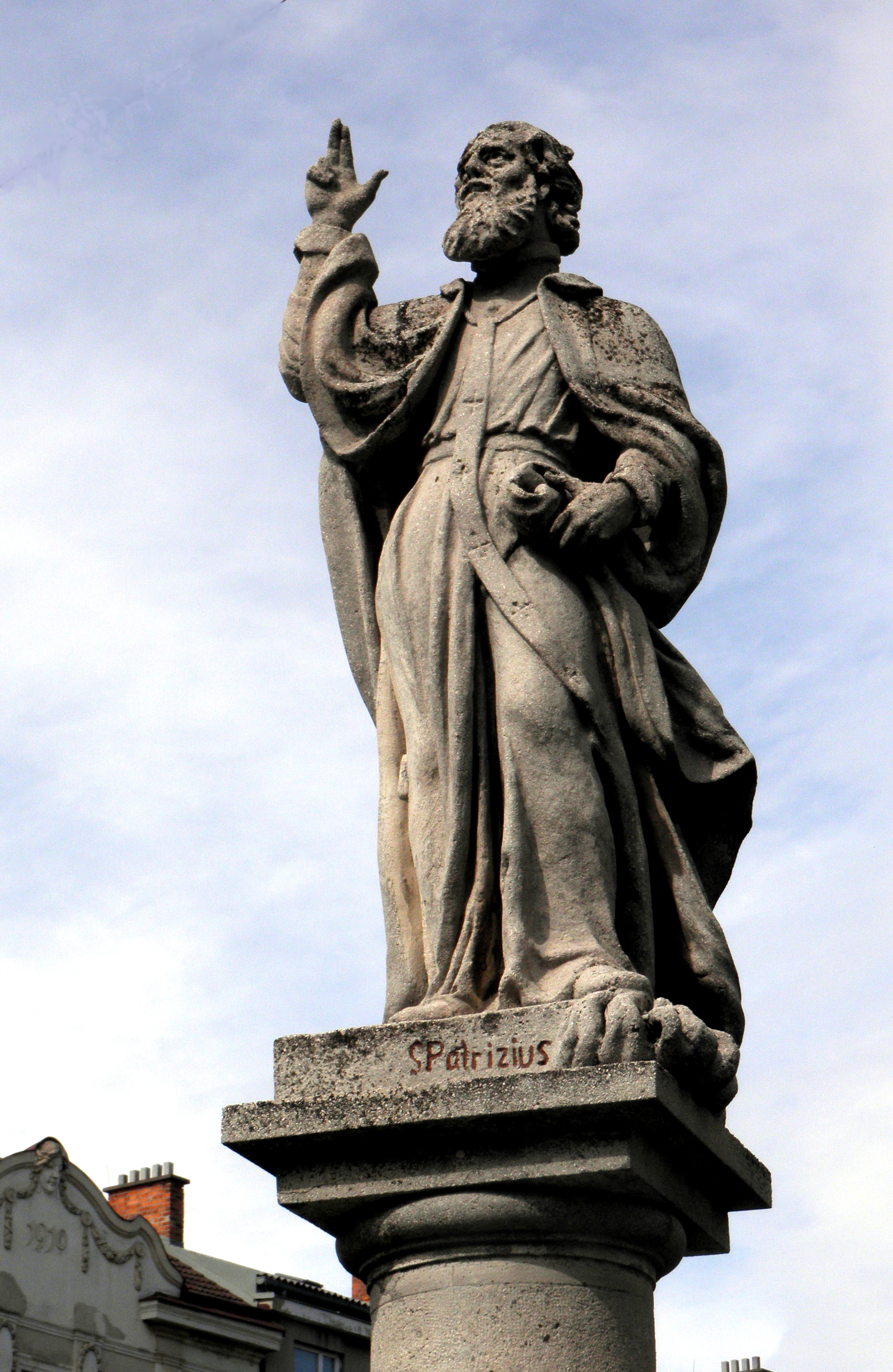 Hl. Patrizius